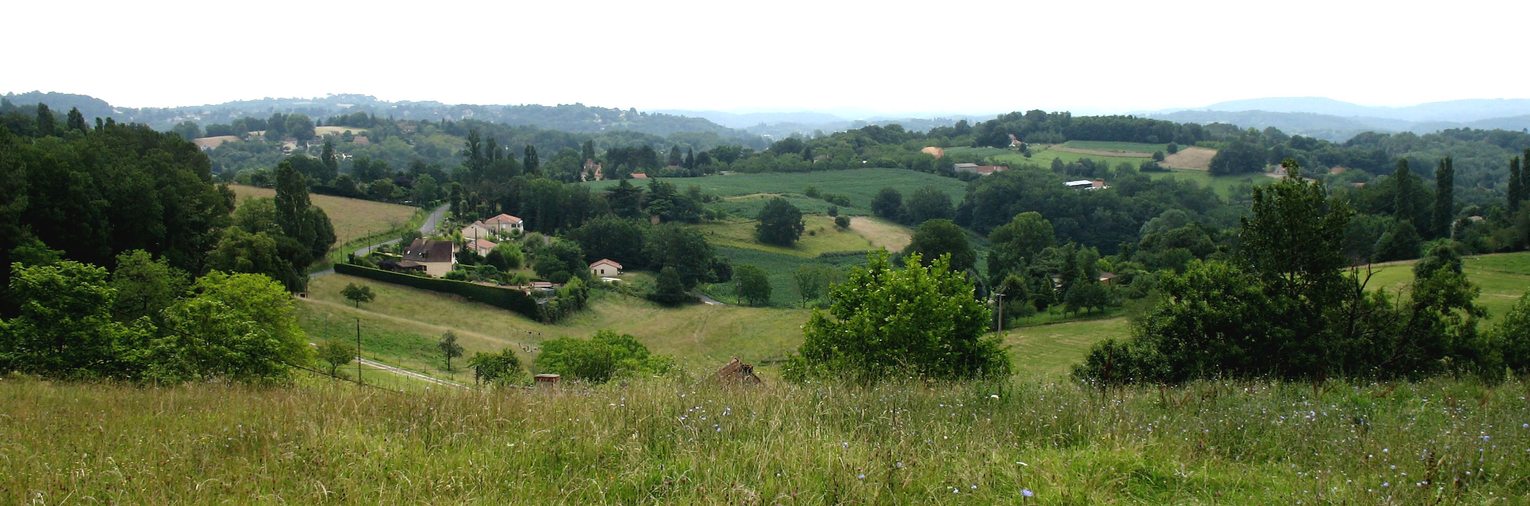 Région de Meyrals, Dordogne, France